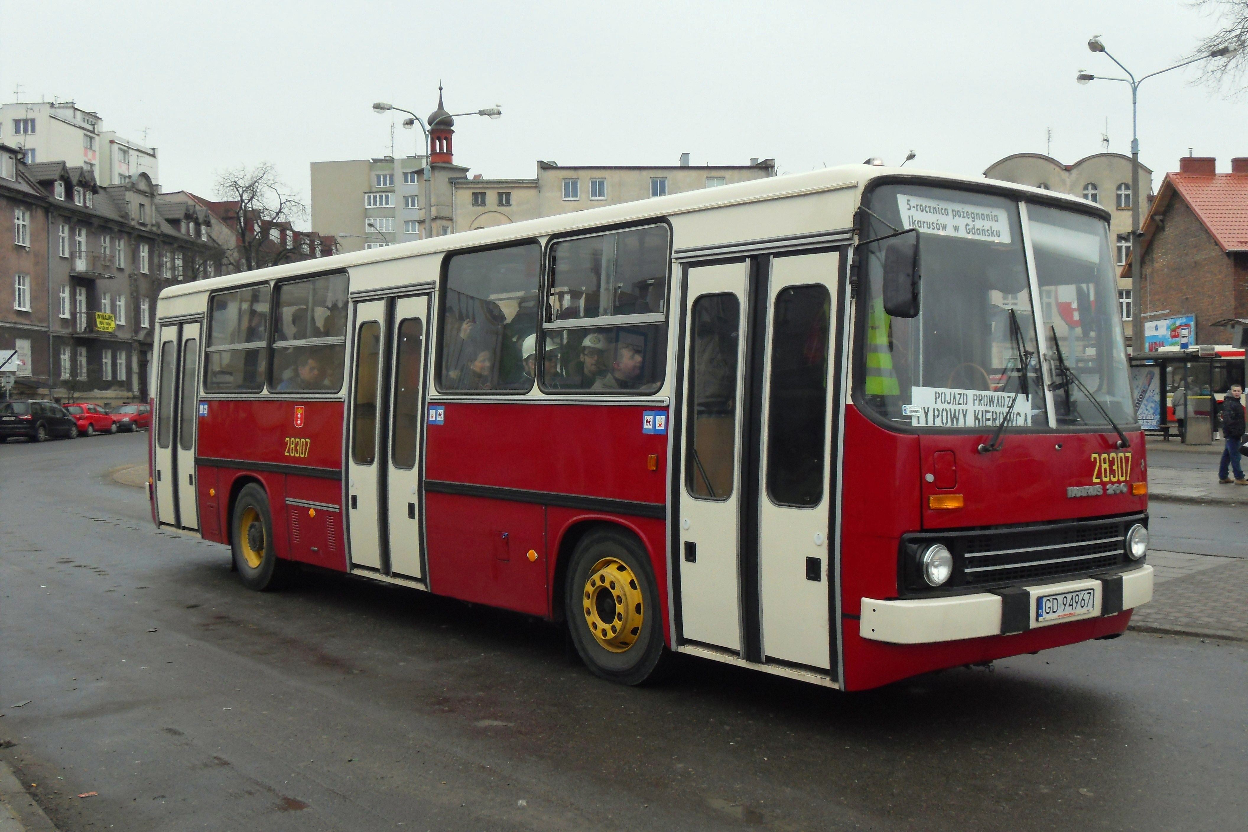 Gdańsk Wrzeszcz, pl. Jerzego Kołodziejskiego, historyczny Ikarus 260.